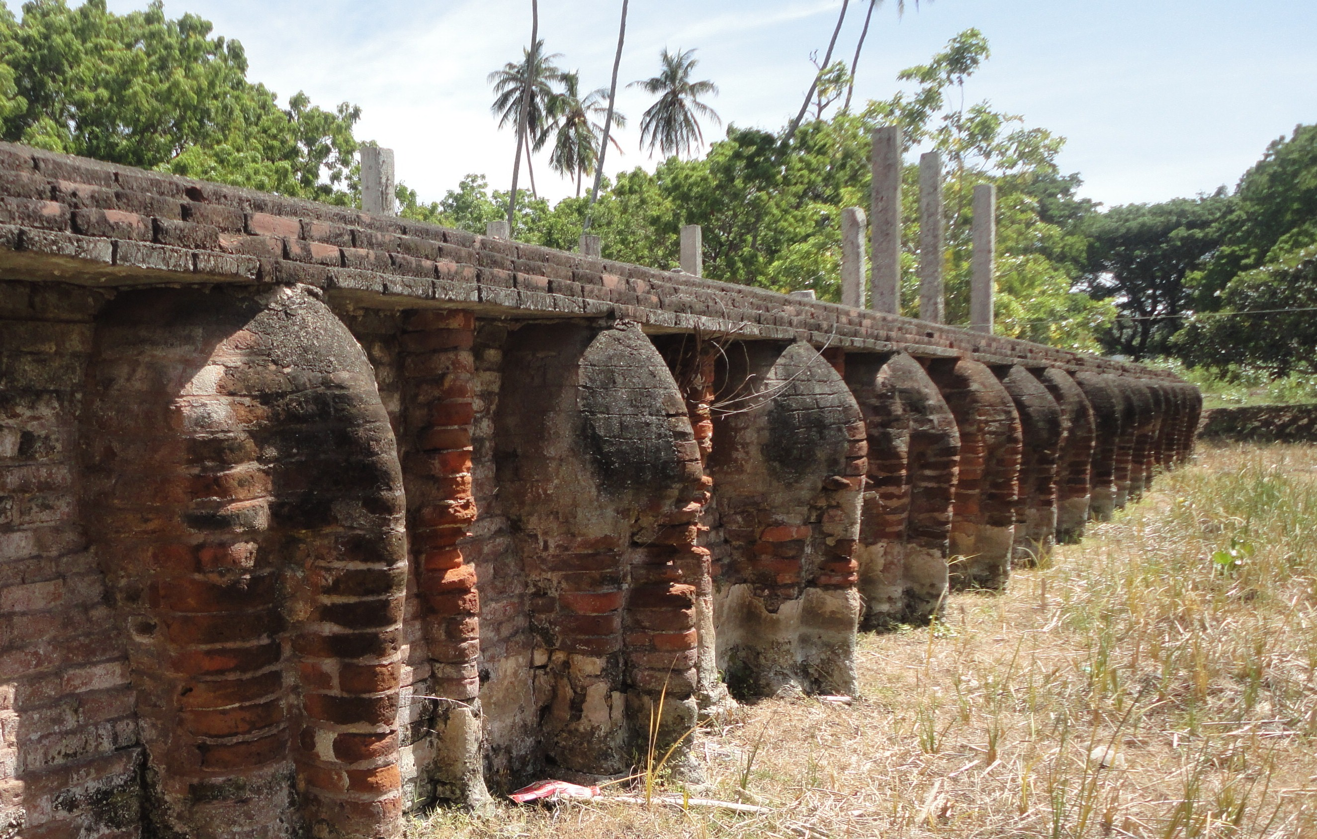 සිංහල: යටාල වෙහෙරේ පුරාණ ඇත් පවුර